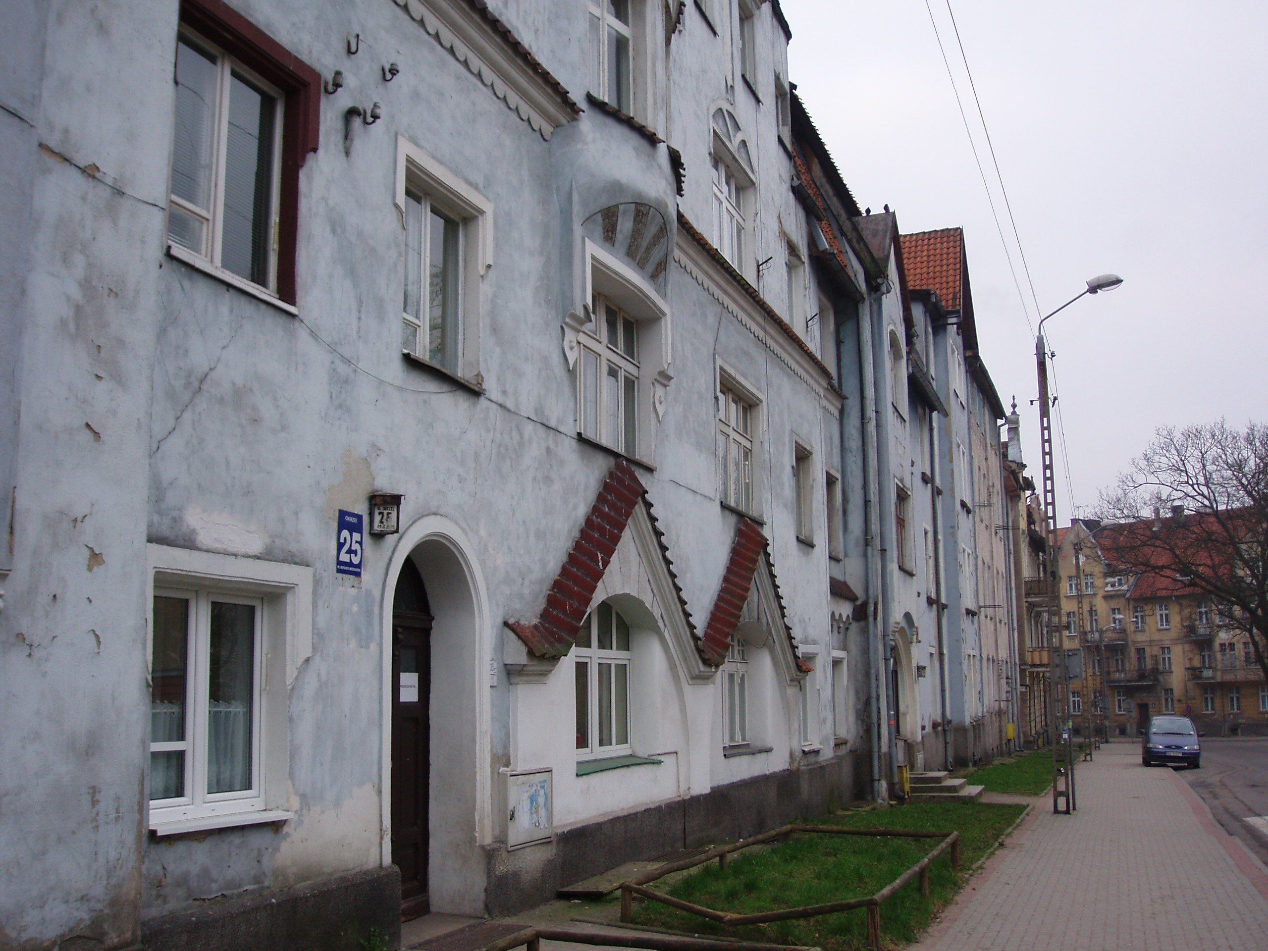 Ulica Okrzei w Olsztynie, róg z Jagiellońską.